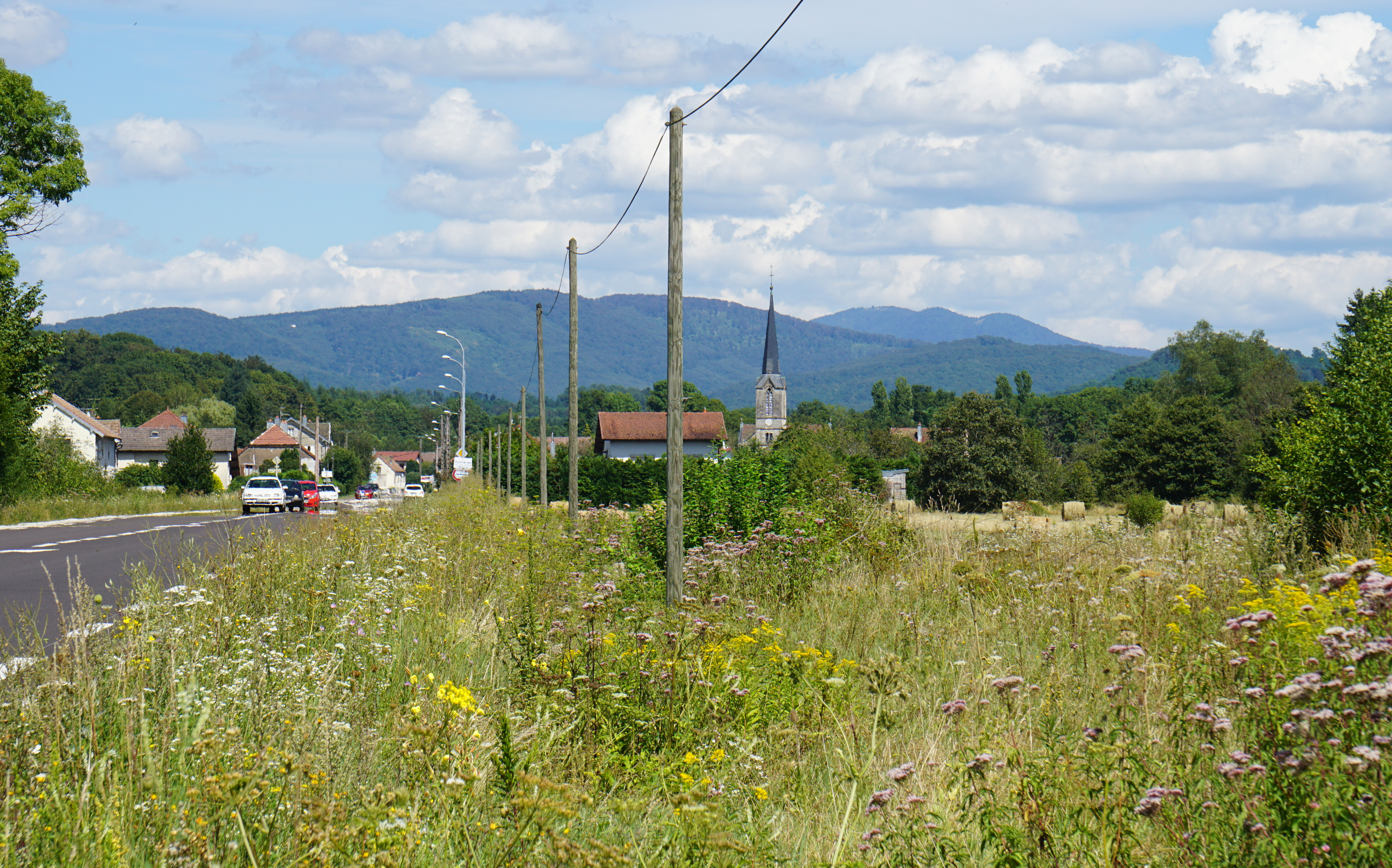 Vue générale de La Côte (Haute-Saône) avec son clocher en flèche et les Vosges en arrière plan.